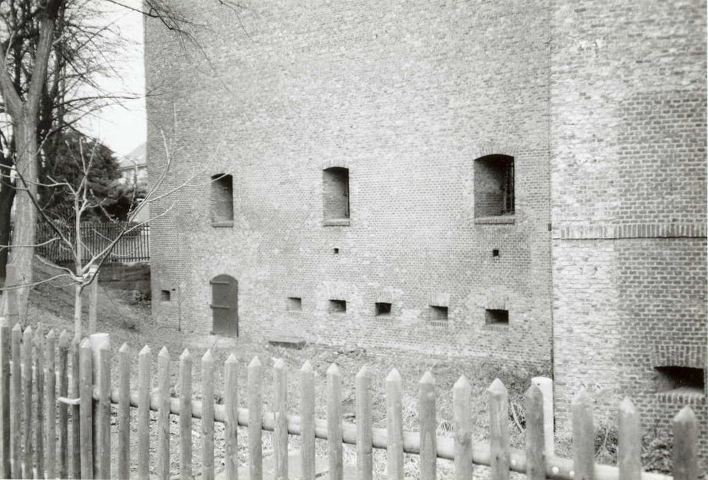 Das Fort Fusternberg in Wesel